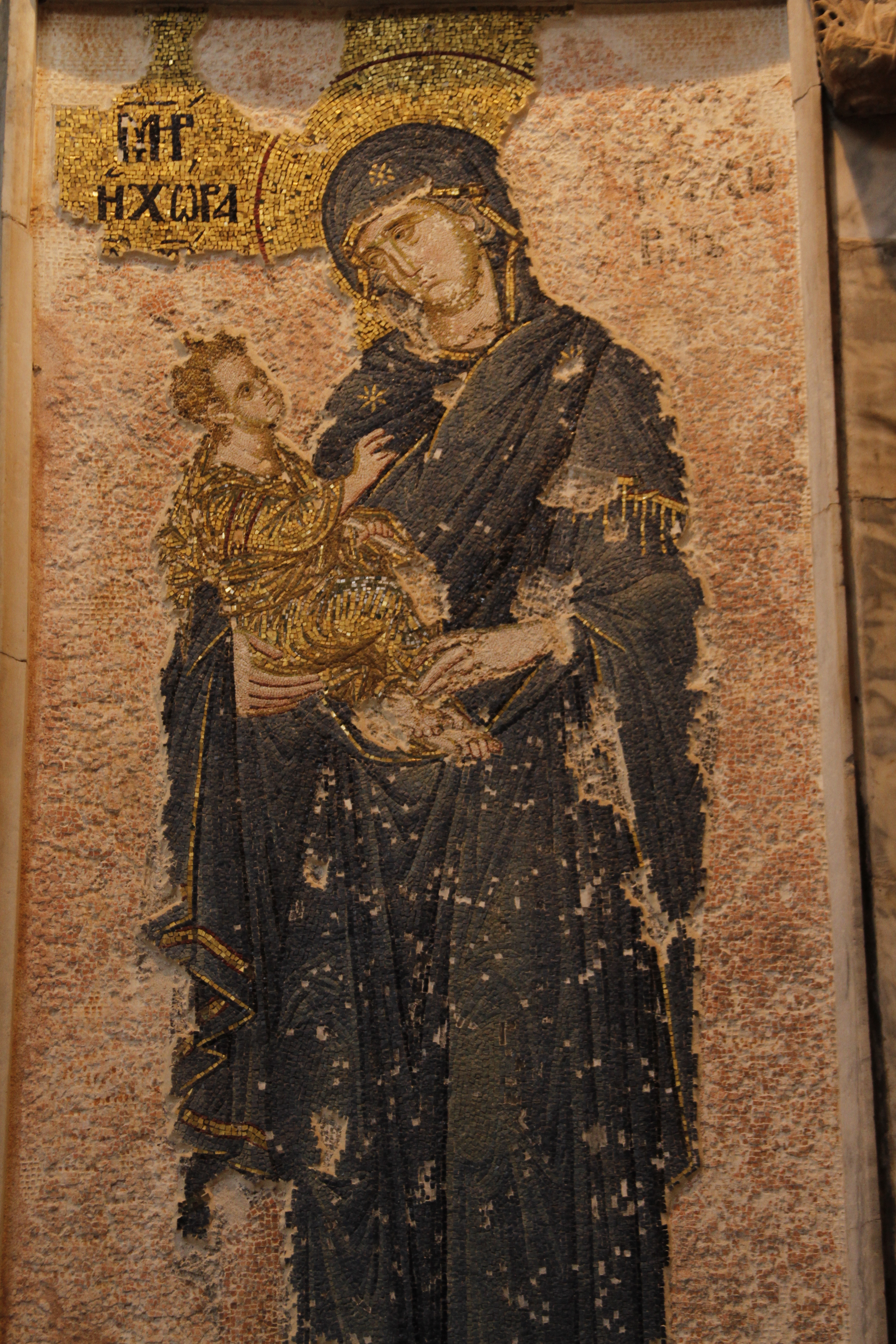 Virgem Hodegetria no Mosaico da Theotokos ("Mãe de Deus") na Igreja de Chora.